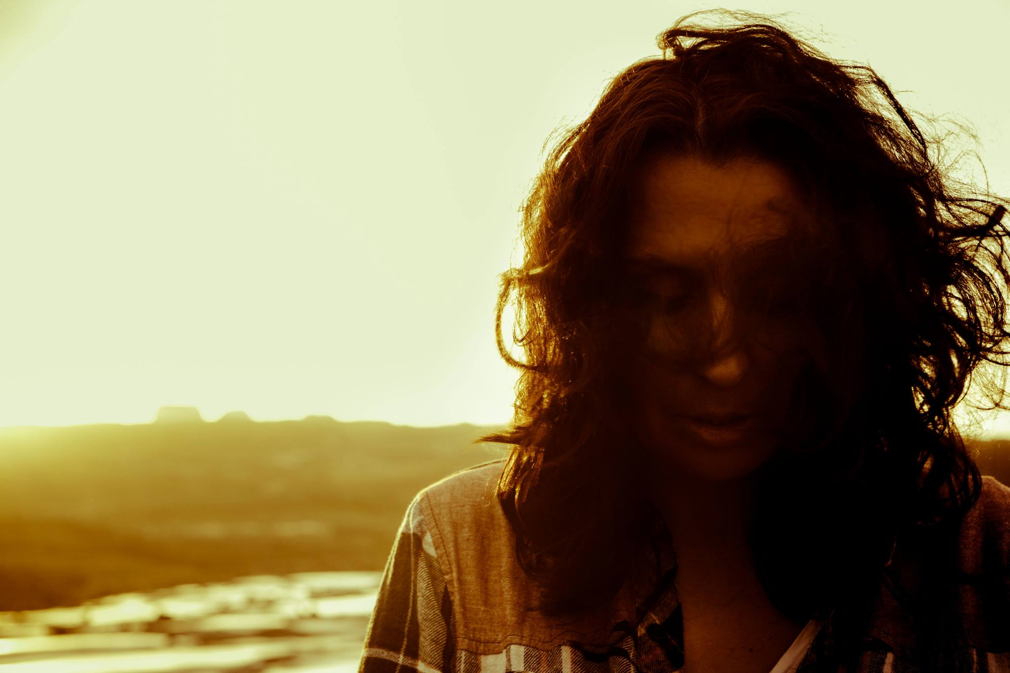 Colline Hill - en écriture sur l'île d'Inis Mor.